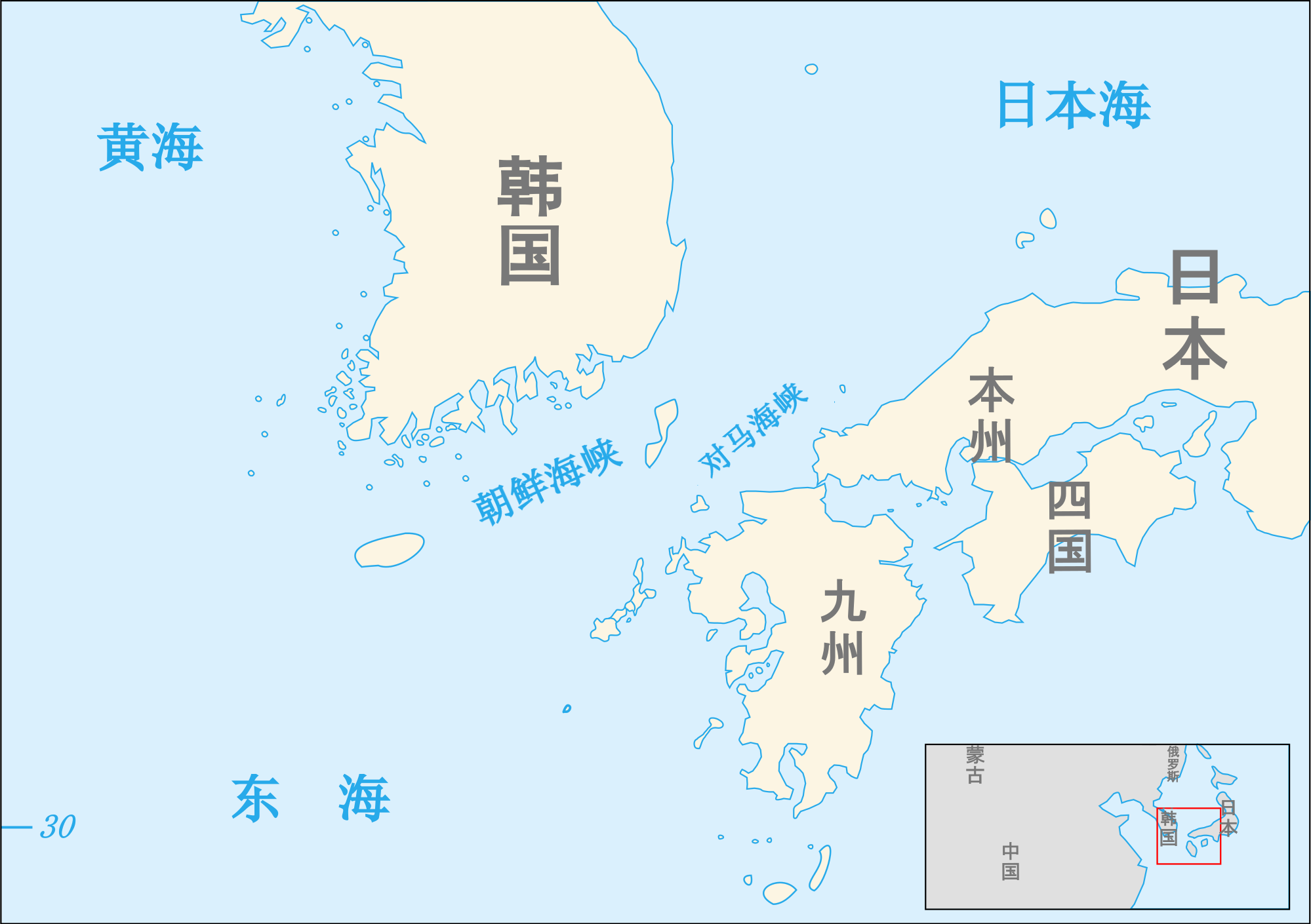 中文（中国大陆）: 朝鲜海峡和对马海峡